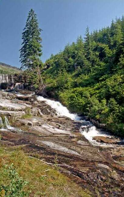 Peřeje na Čertově strouze autor:Zp